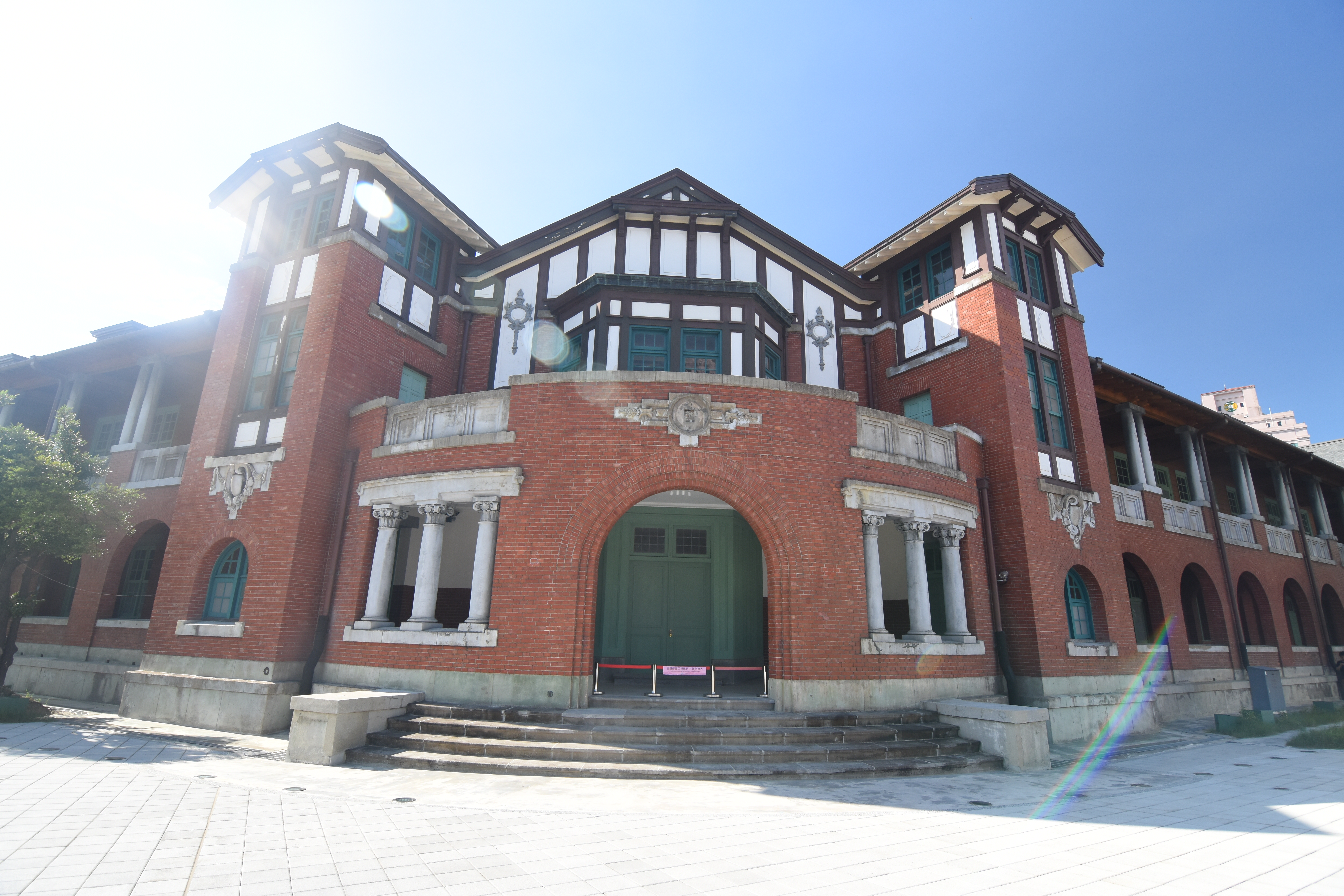 臺灣總督府鐵道部（臺北工場）